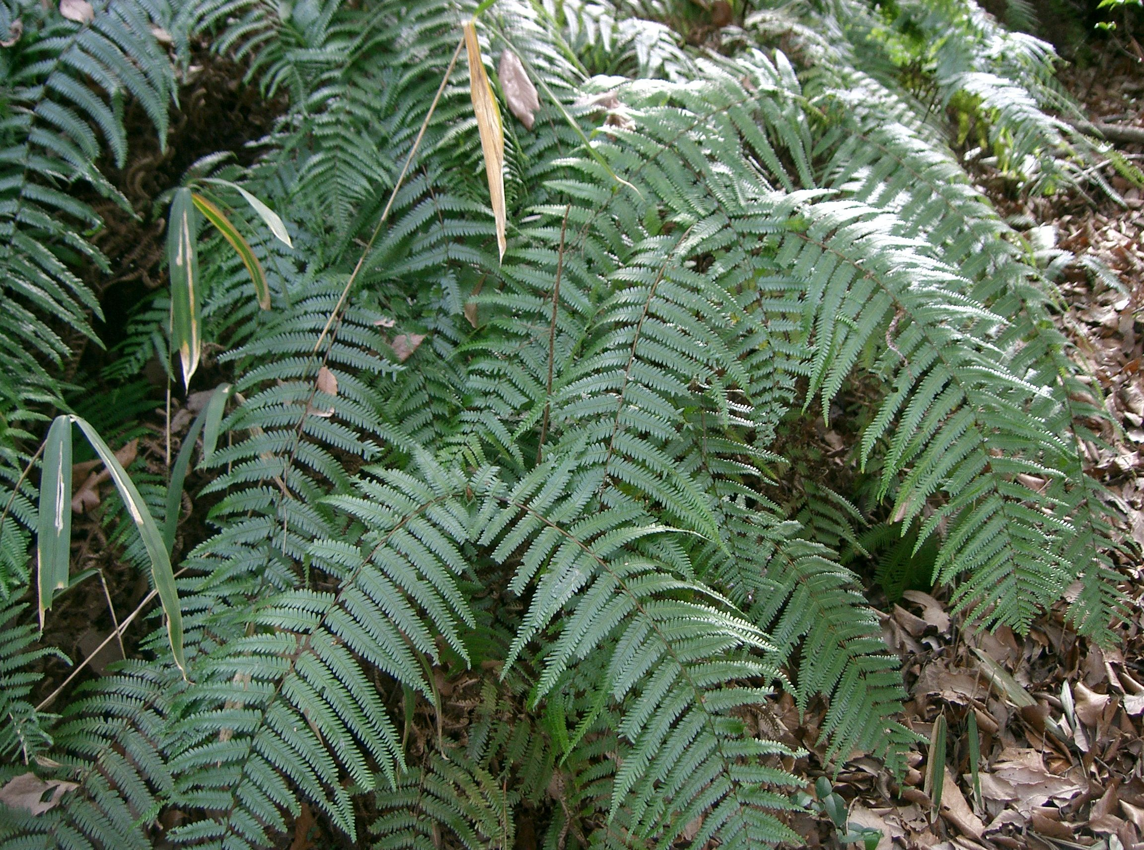 Diplopterygium pinnatum